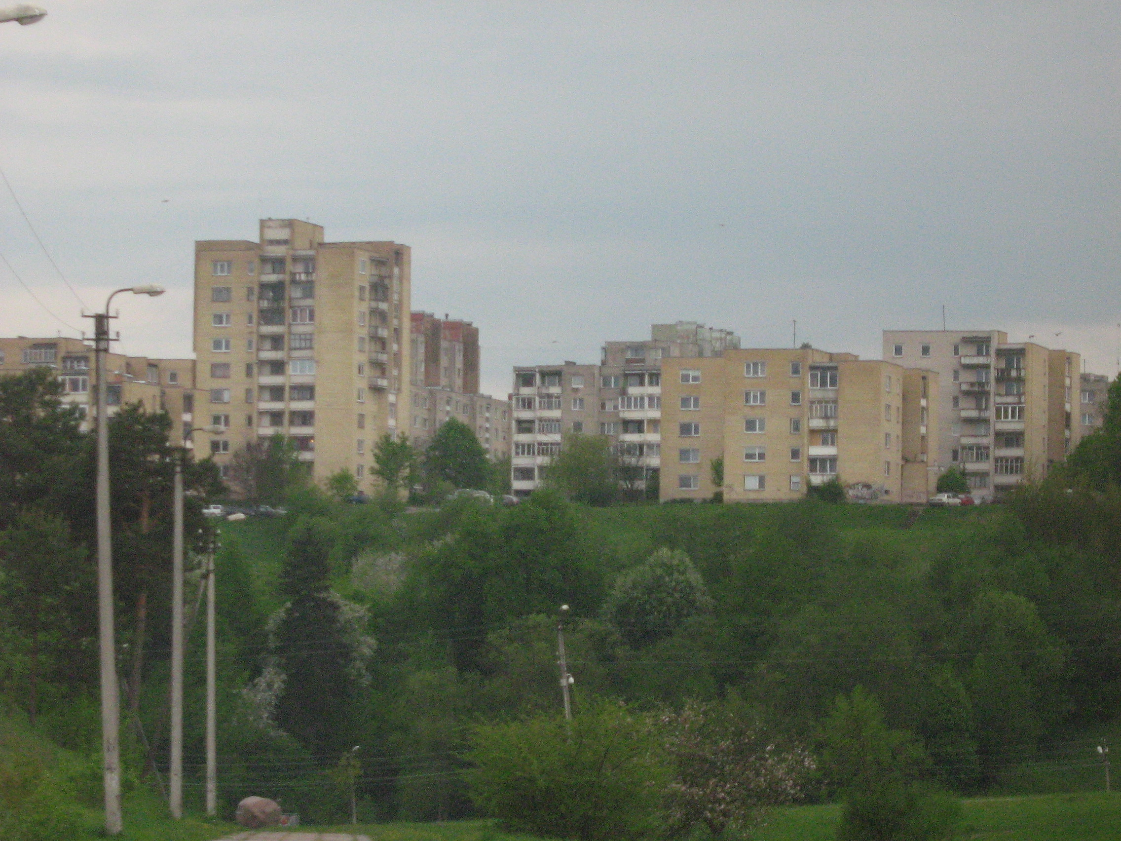 Rimkų mikrorajonas